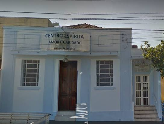 Frente do Centro Espírita Amor e Caridade, Ribeirão Preto, SP